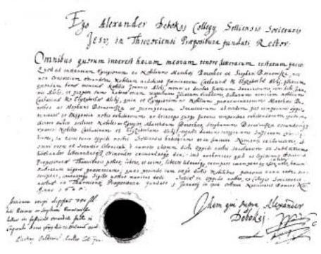 Dobokay Sándor kézirata